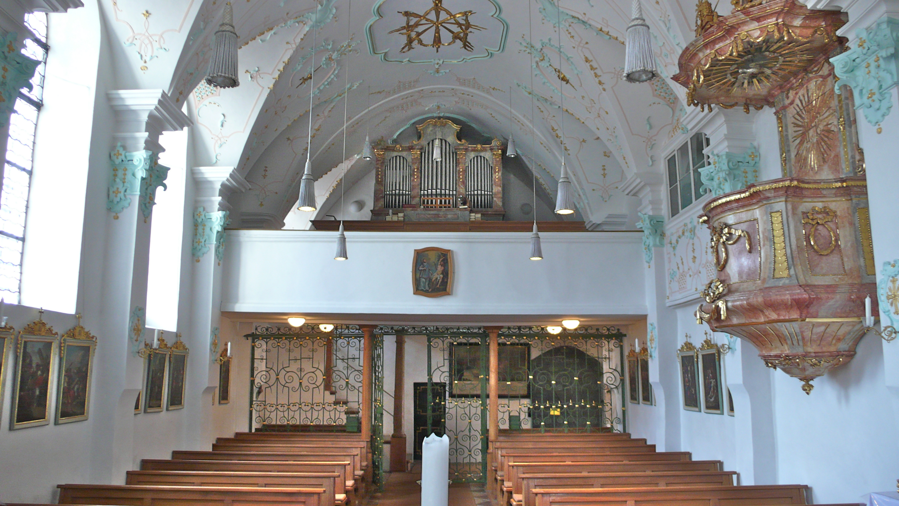 Pfarrkirche St. Valentin Marzoll (Bad Reichenhall) - Blick zur Orgelempore